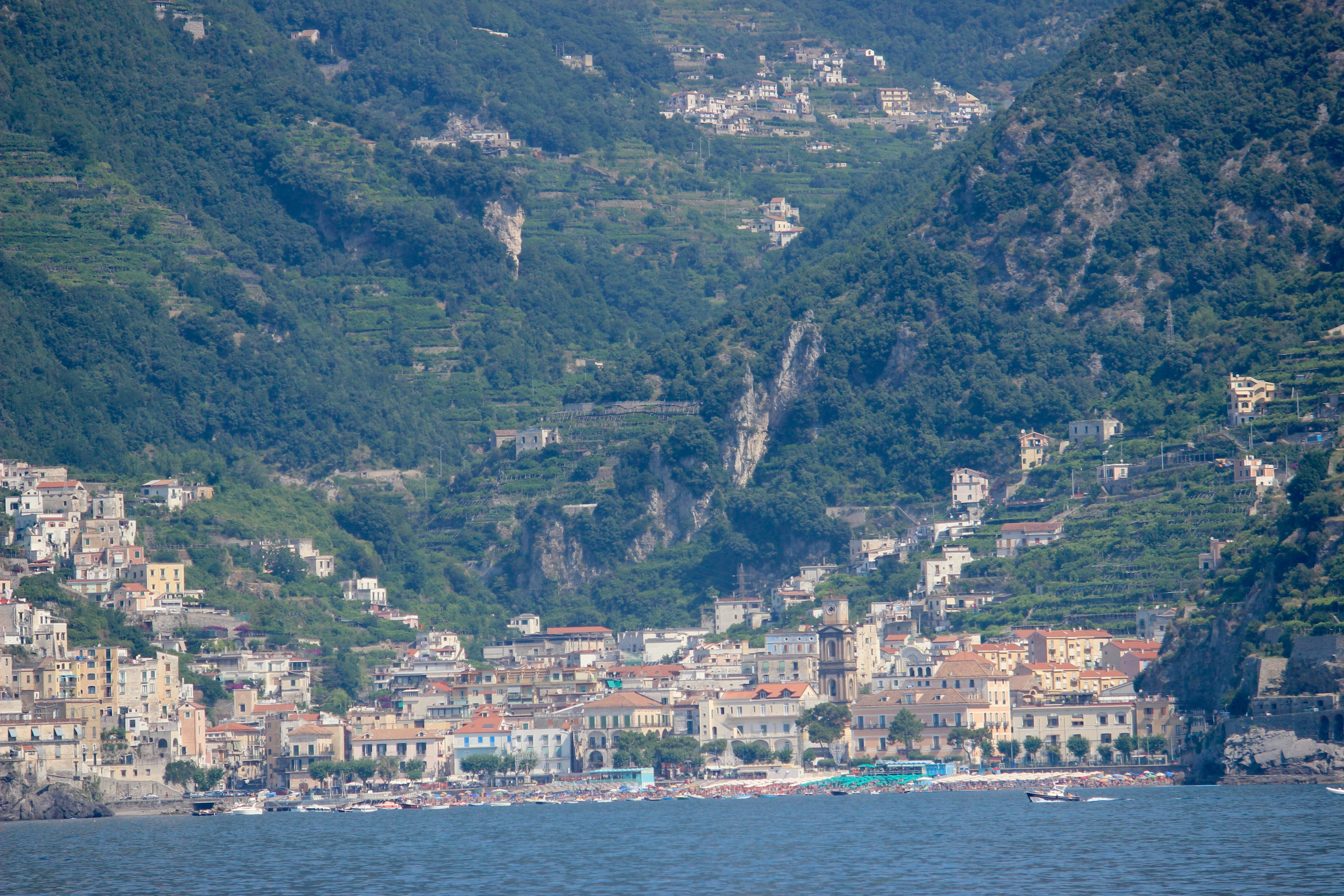 Minori desde el mar.